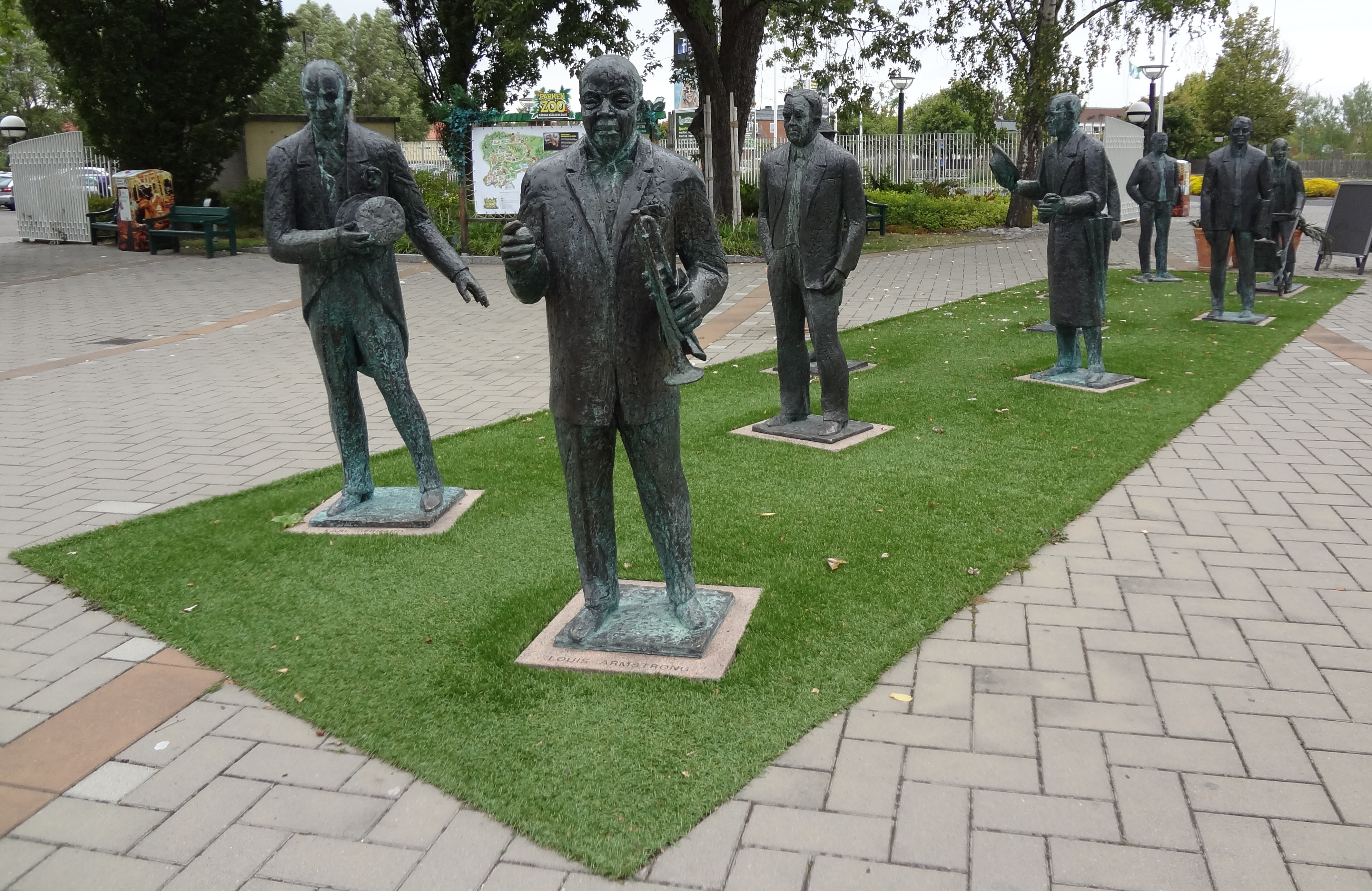 Konstverket "Ju mer vi är tillsammans" av Herman Reijers vid ingången till Parken Zoo i Eskilstuna.